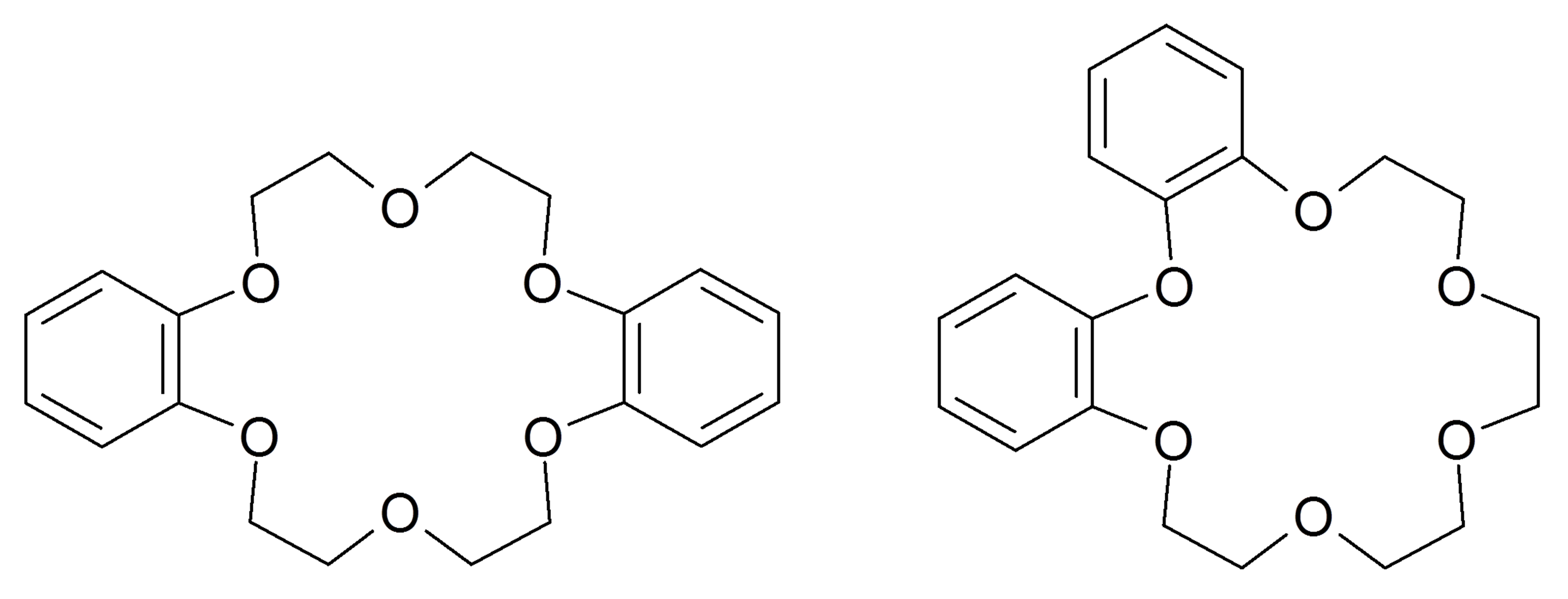 dibenzo 18-crown-6